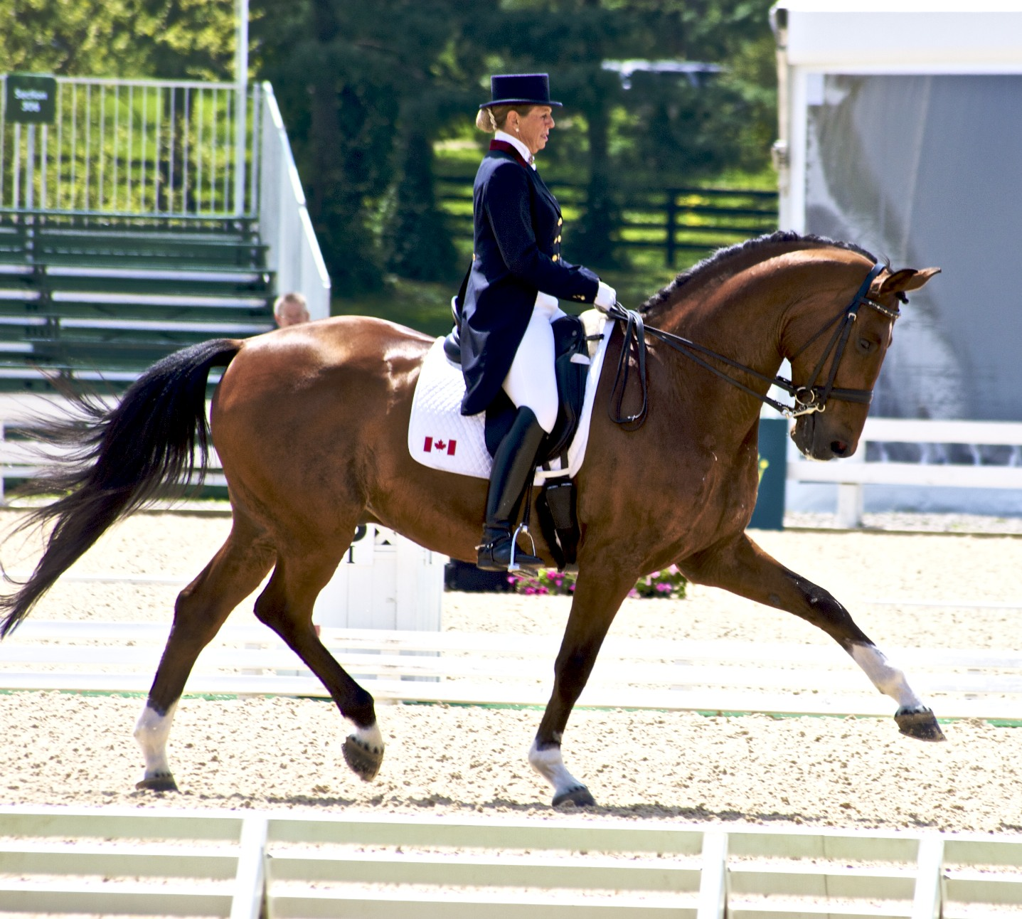 Pikardi & Bonny Bonnello - 2010 Kentucky Cup